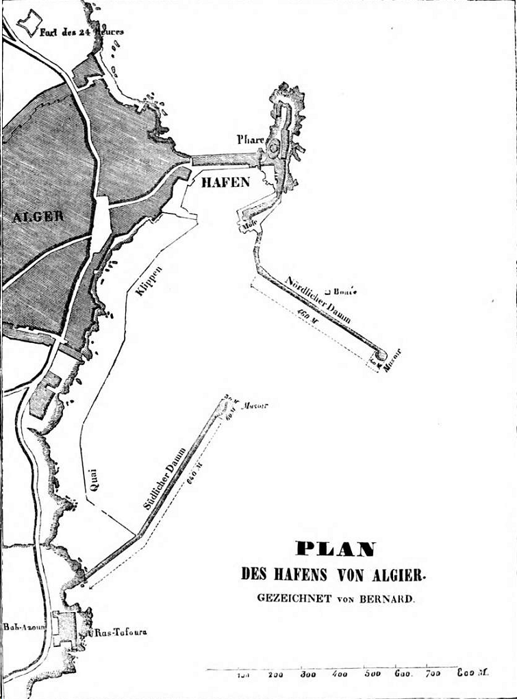 Plan des Hafens von Algier.